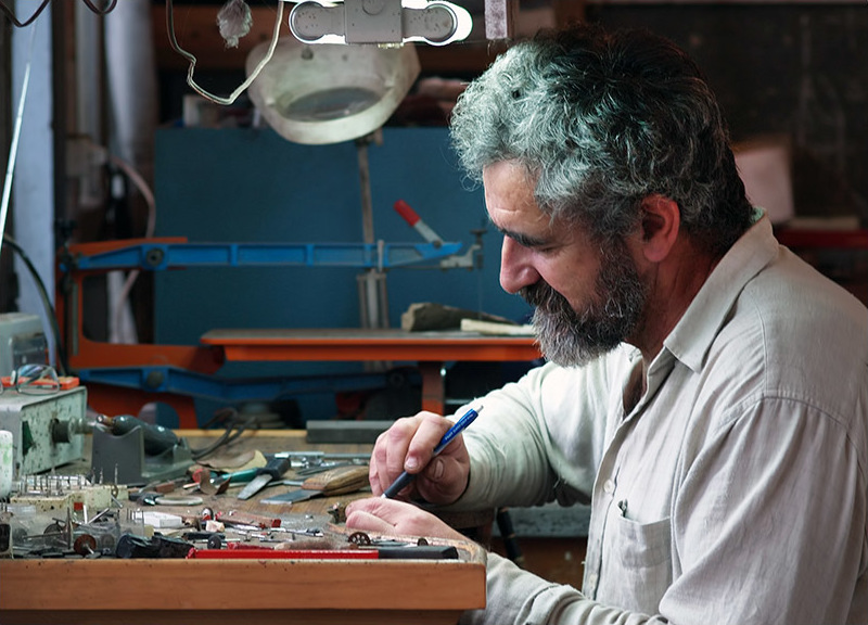 Eliseo Nicolás Alonso - "Lise" en el que fue su Taller de trabajo